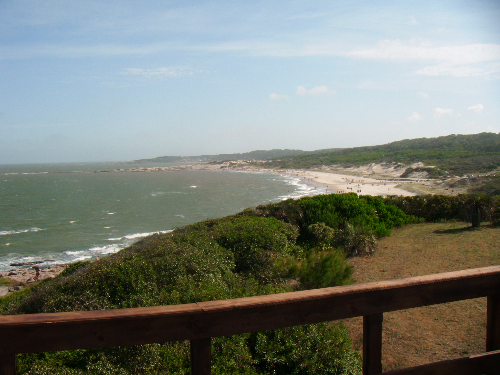 View of the Achiras Beach at Santa Teresa (Rocha, Uruguay)